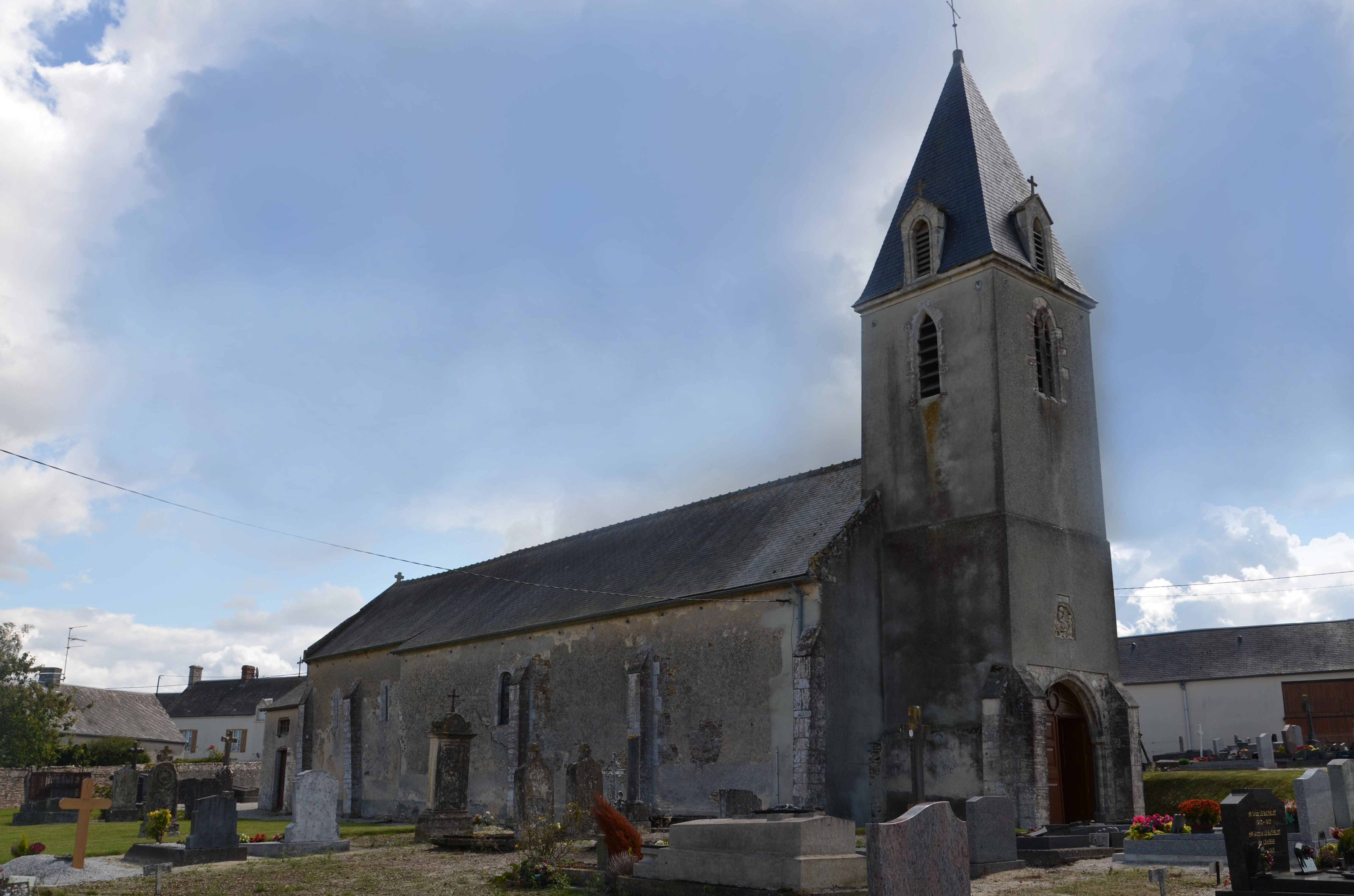 Église Saint-Martin de Tournières.